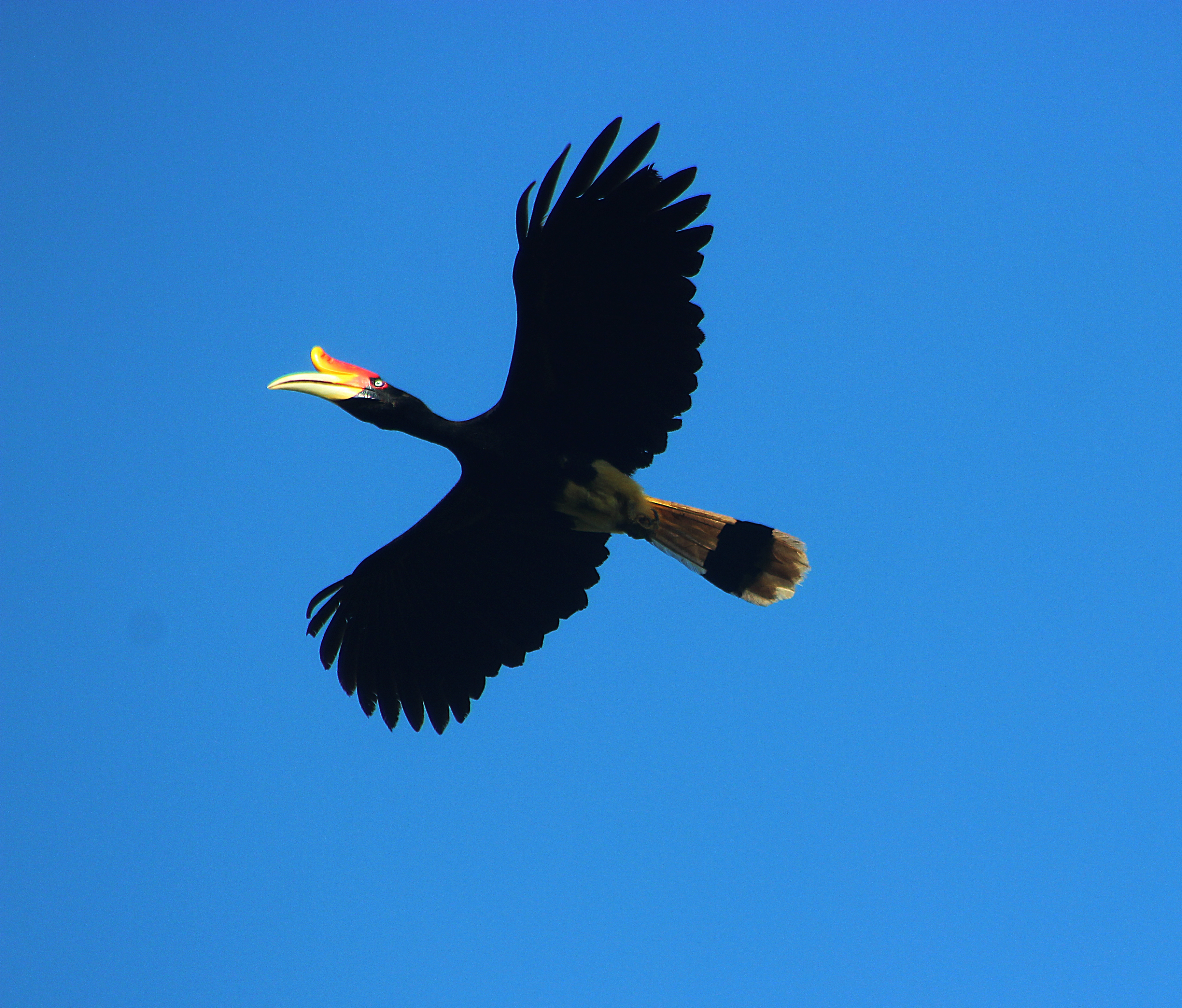 Seekor Rangkong Badak dapat terbang dalam radius 100 km persegi. Artinya, burung yang termasuk dalam keluarga Bucerotidae ini dapat menebar biji hingga 100 km jauhnya. Menurut peneliti rangkong dan hutan tropis, rangkong badak dijuluki sebagai petani hutan karena kehebatannya menebar biji sehingga terdapat korelasi erat antara rangkong badak dengan hutan yang sehat.